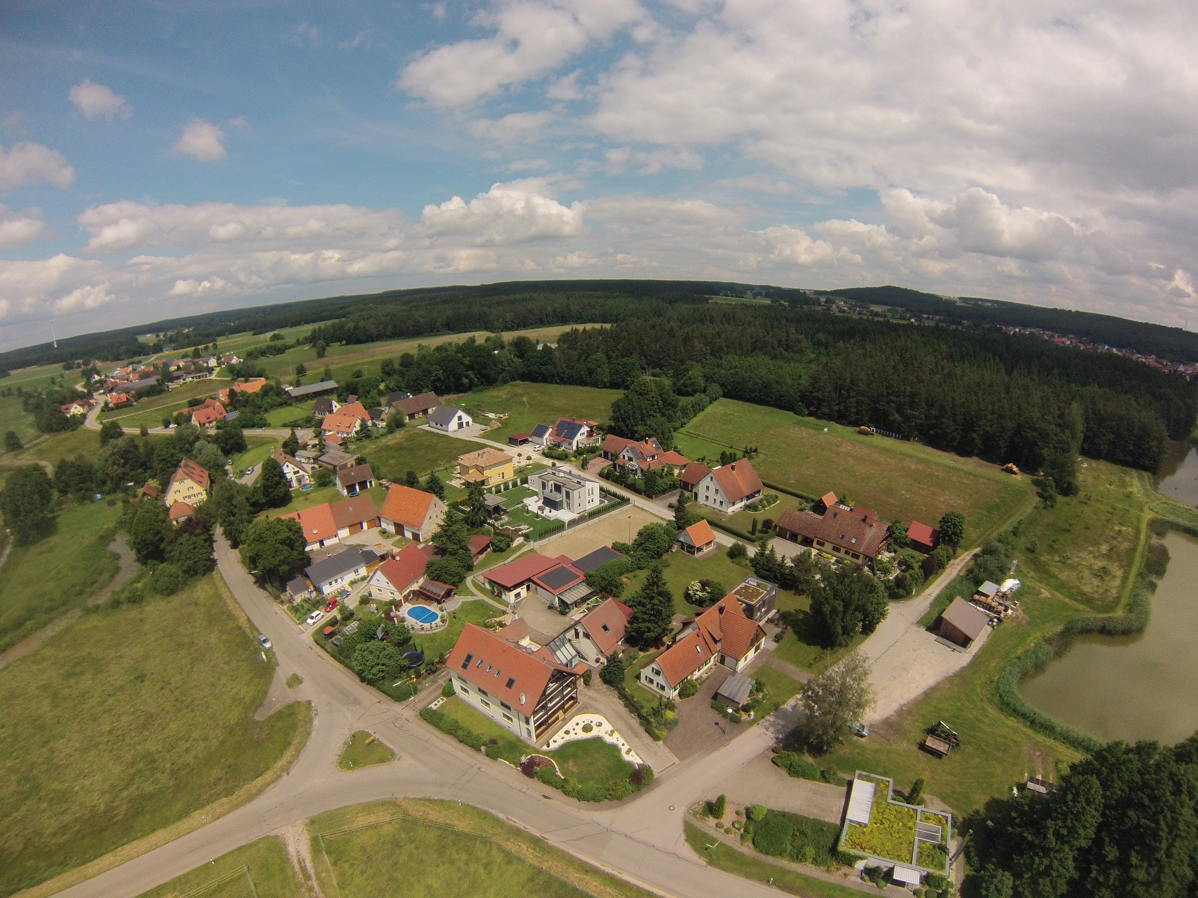 Oberkemmathen Luftaufnahme (2016)